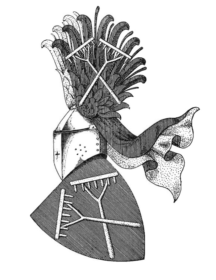 Erb - Hrabišici